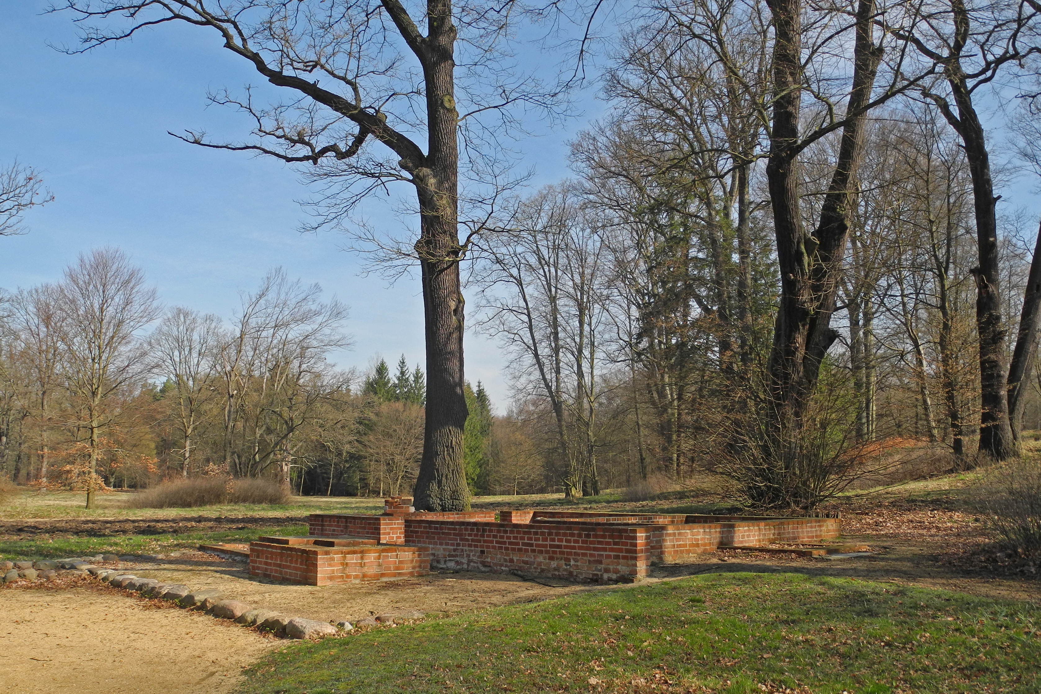 Fundamente des ehem. Englischen Hauses am Beginn des Panoramawegs im polnischen Teil des Muskauer Parks